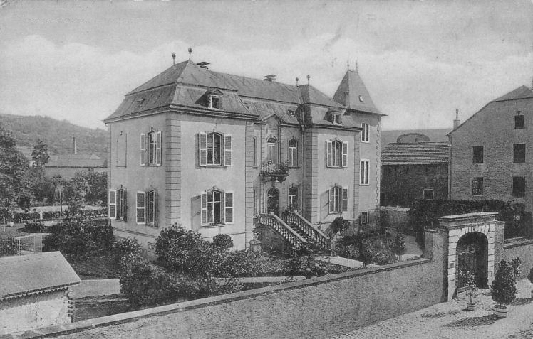 Echternach (Luxembourg): rue de Luxembourg. Demeure construite en 1765 par l'écoutète Théodore Lorent. D'après une carte postale des années 1920.